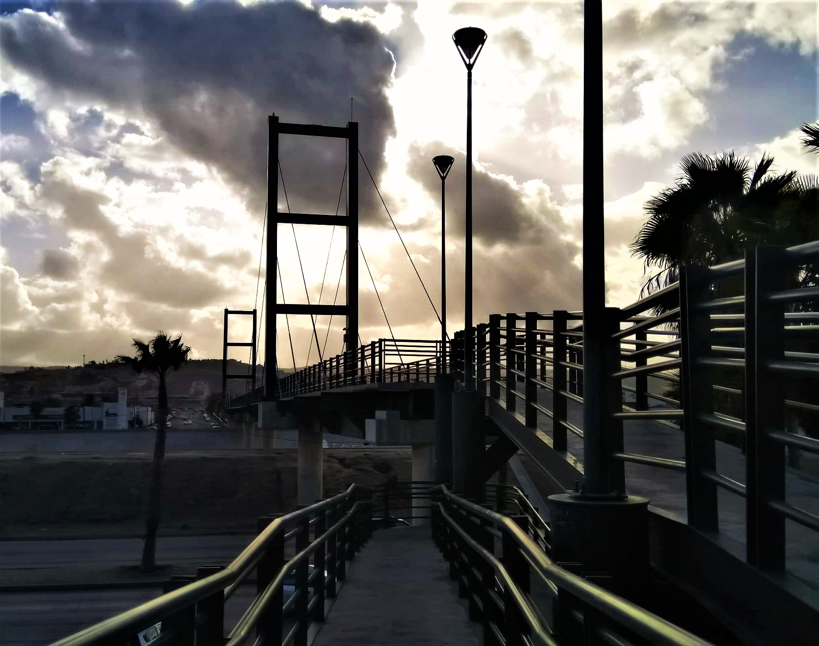 Puente peatonal del Sistema Integral de Transporte de Tijuana